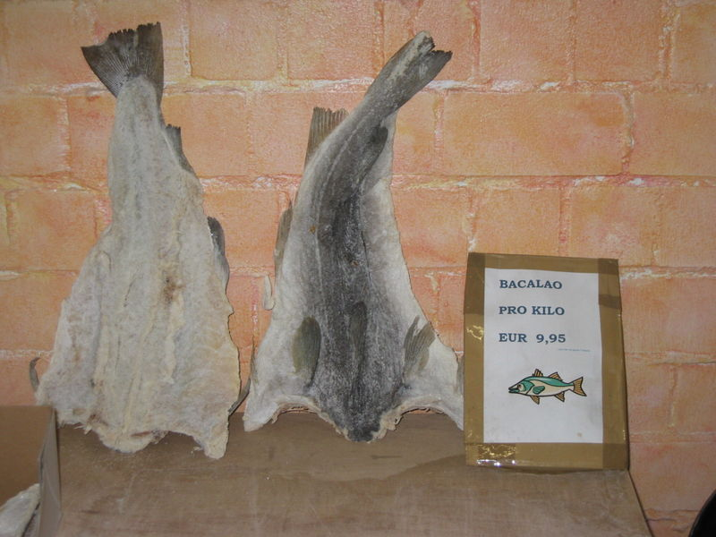 Norwegischer Klippfisch in spanischem Supermarkt